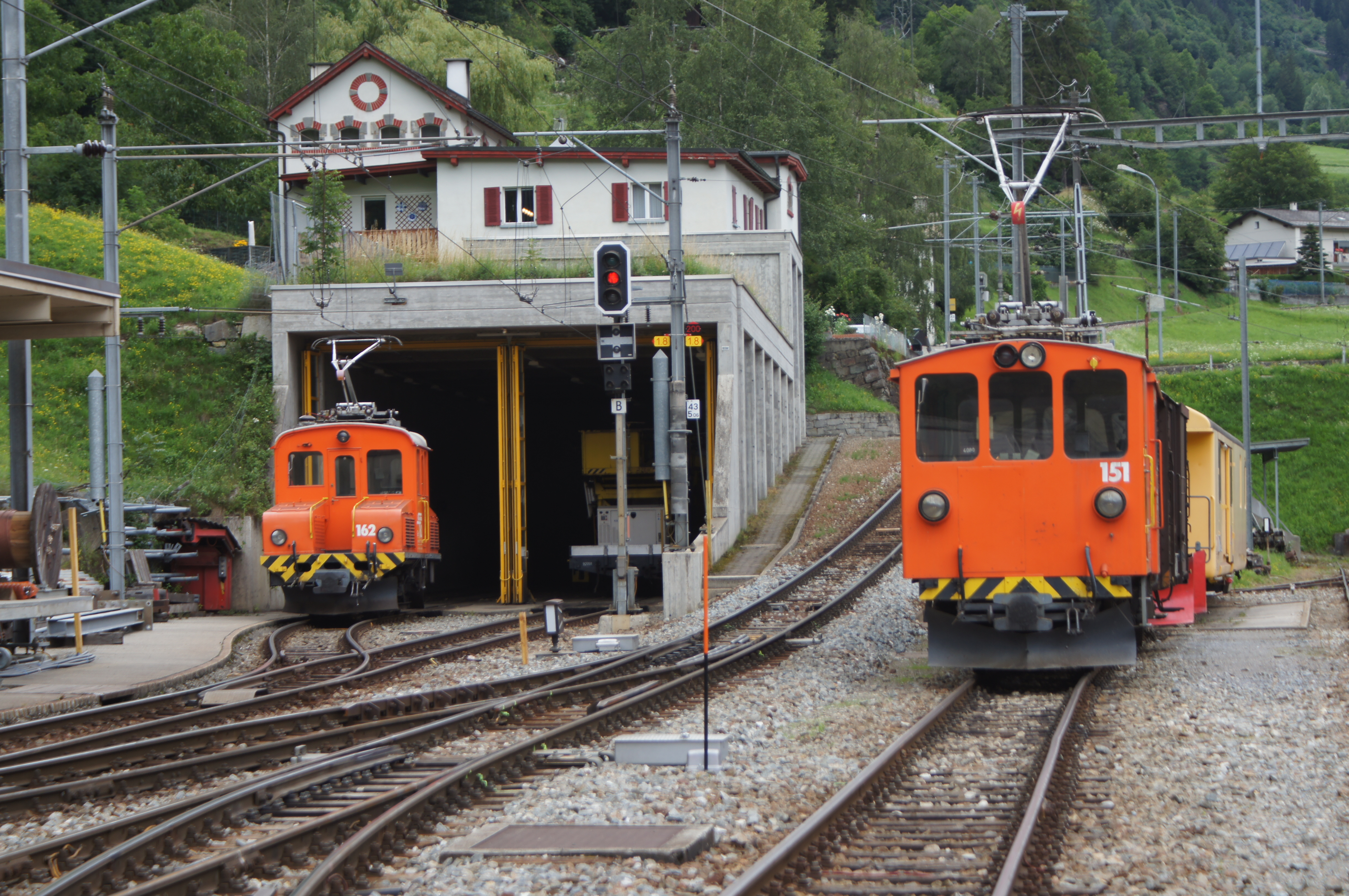 RhB Ge 2/2 162 und De 2/2 151 als Rangierlok in Poschiavo.